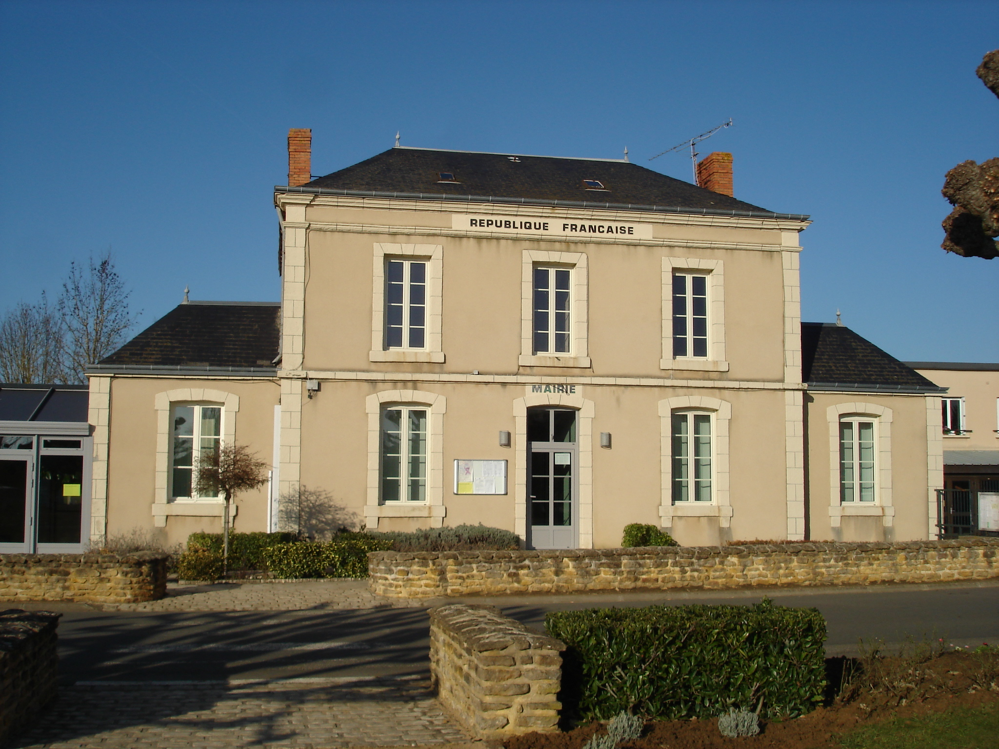 Lacs (36) : La mairie.